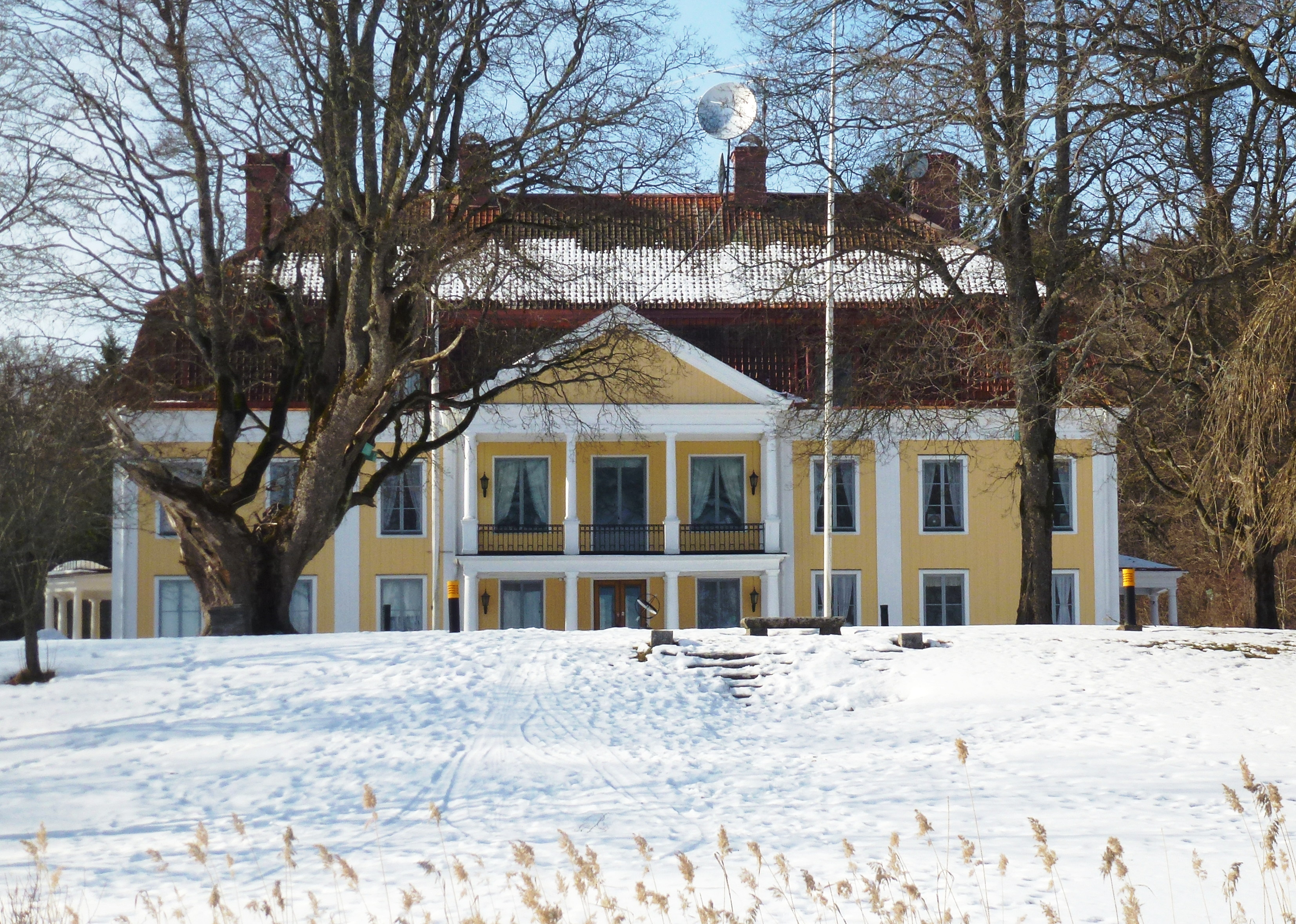 Malmsjö gård, fasad mot Malmsjön